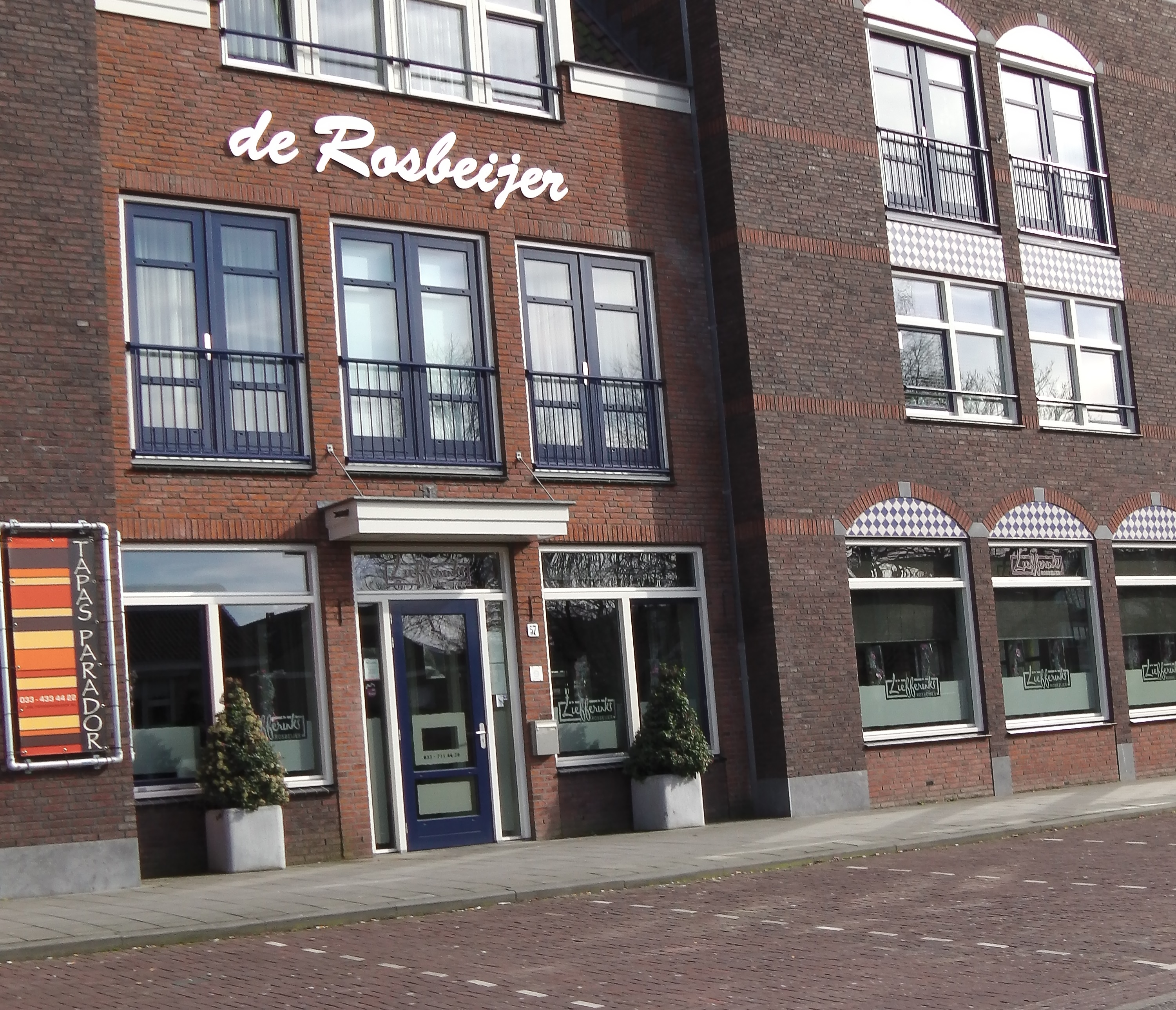 Restaurant gelegen aan de Hamersveldseweg in het centrum van de stad. (Rosbeijer & Tapas Parador)